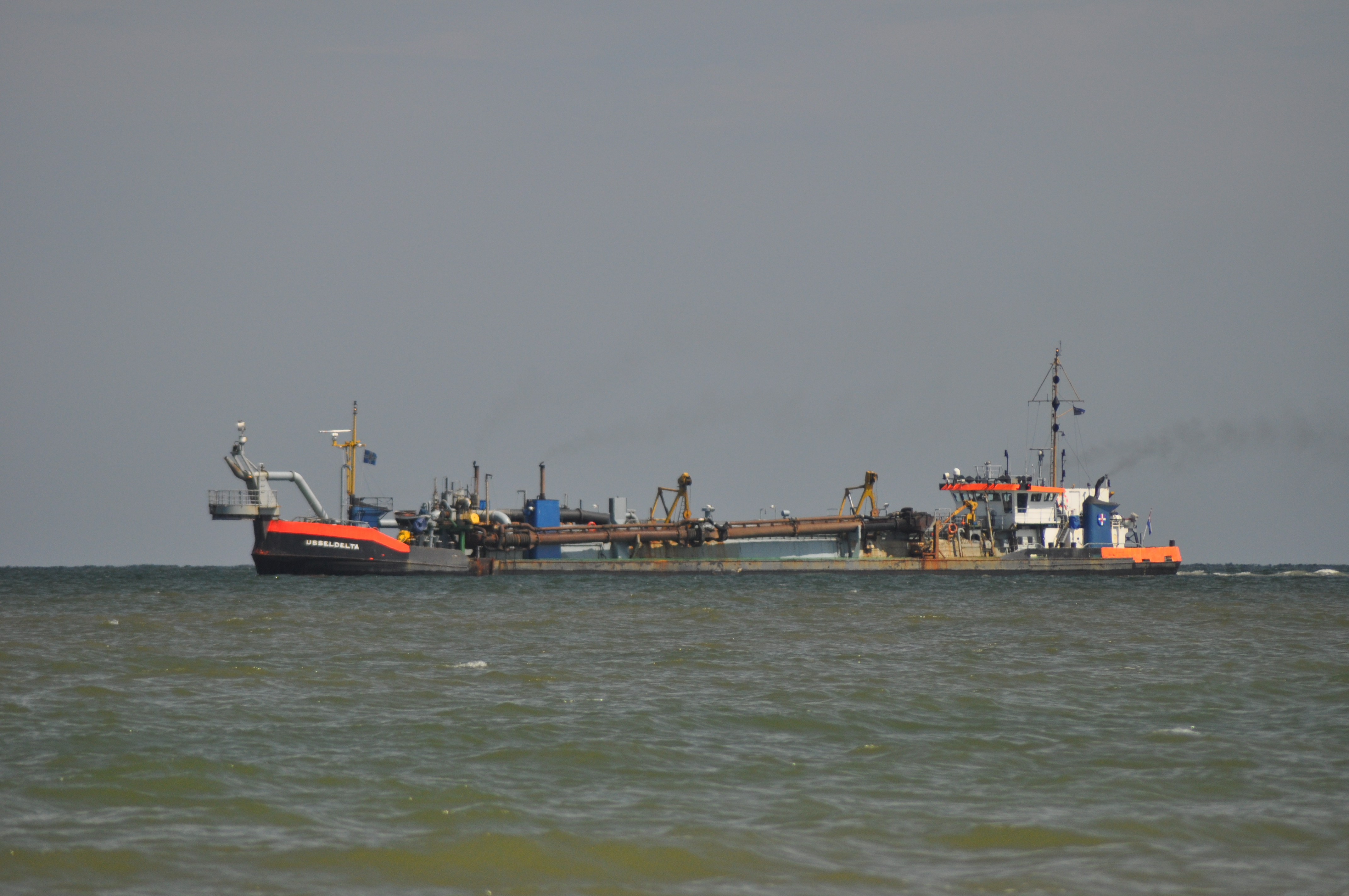 Sandaufspülung mit Hilfe des Dropverfahrens. Das Saugbaggerschiff hat die Laderäume mit Sand gefüllt und fährt an die Entladestelle vor der Küstenlinie. Hier werden die Bodenklappen des Schiffes geöffnet, um die Ladung auf dem Meeresgrund zu platzieren. Wo aufgrund zu geringer Tiefe eine Öffnung der Bodenklappen nicht möglich ist, wird ein Sand-Wasser-Gemisch mit Hilfe des Rainbow-Verfahrens entladen. Hier zu sehen ist das Saugbaggerschiff Ijsseldelta der Rijkswaterstaat im Juli 2010 vor der westfriesischen Insel Ameland.